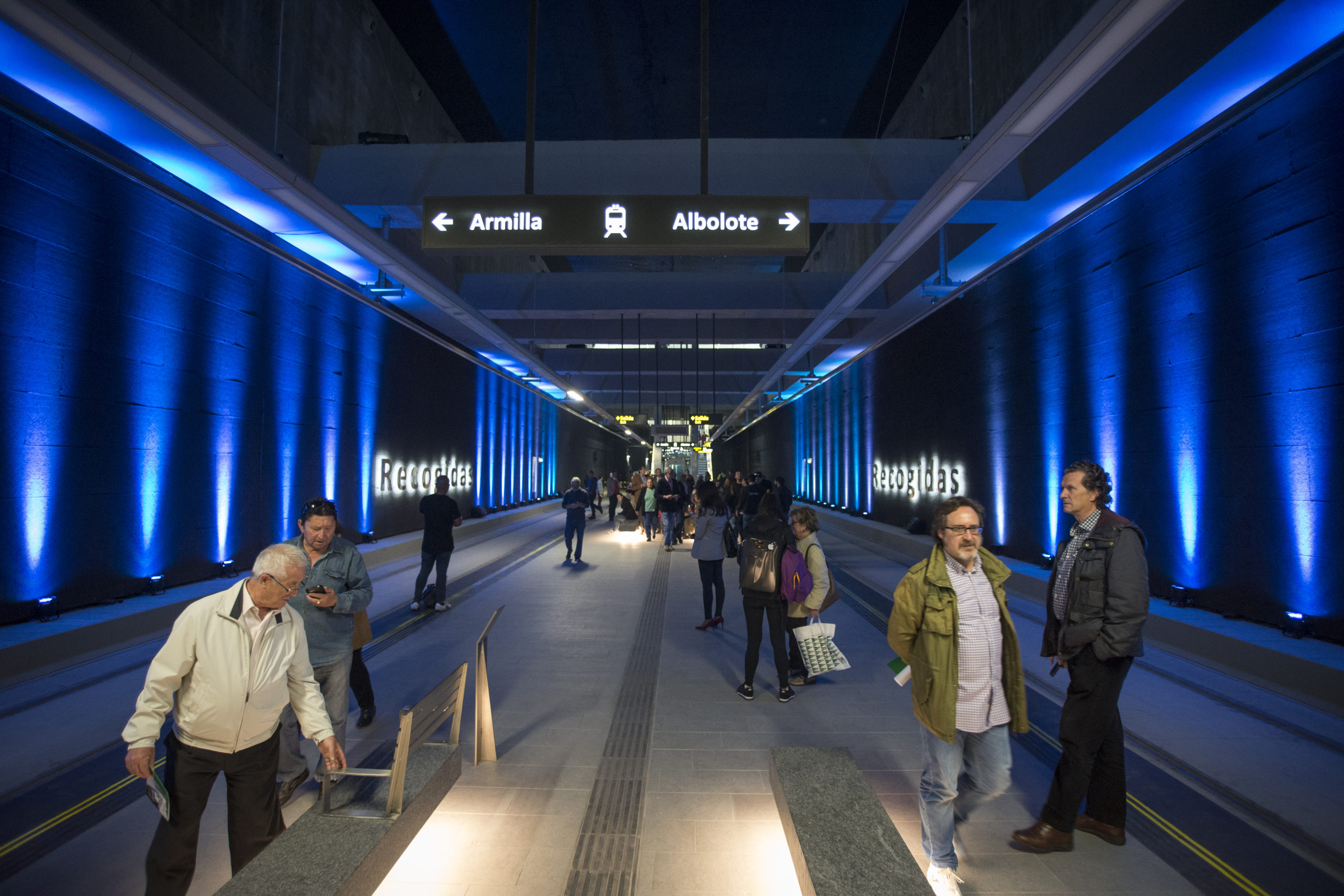 Estación de Recogidas